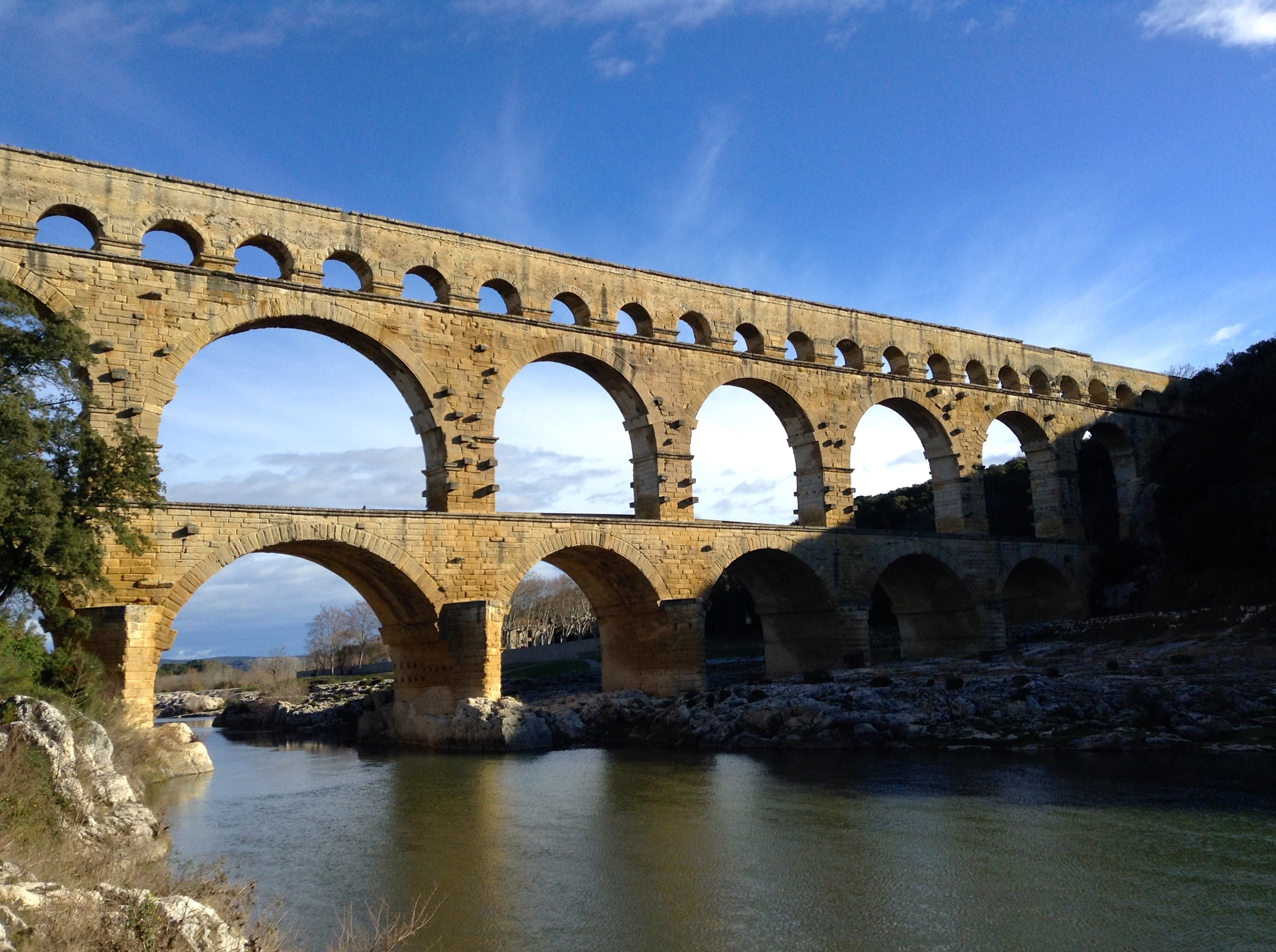 Le pont du Gard est un pont-aqueduc romain à trois niveaux, situé à Vers-Pont-du-Gard entre Uzès et Nîmes, dans le département du Gard (France)